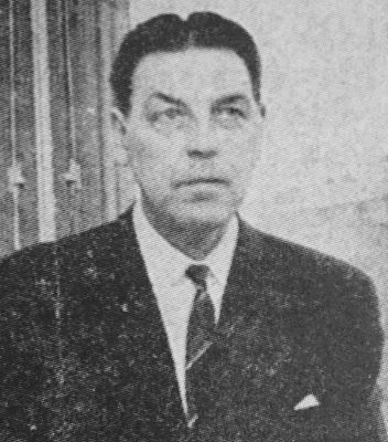 John Mattson